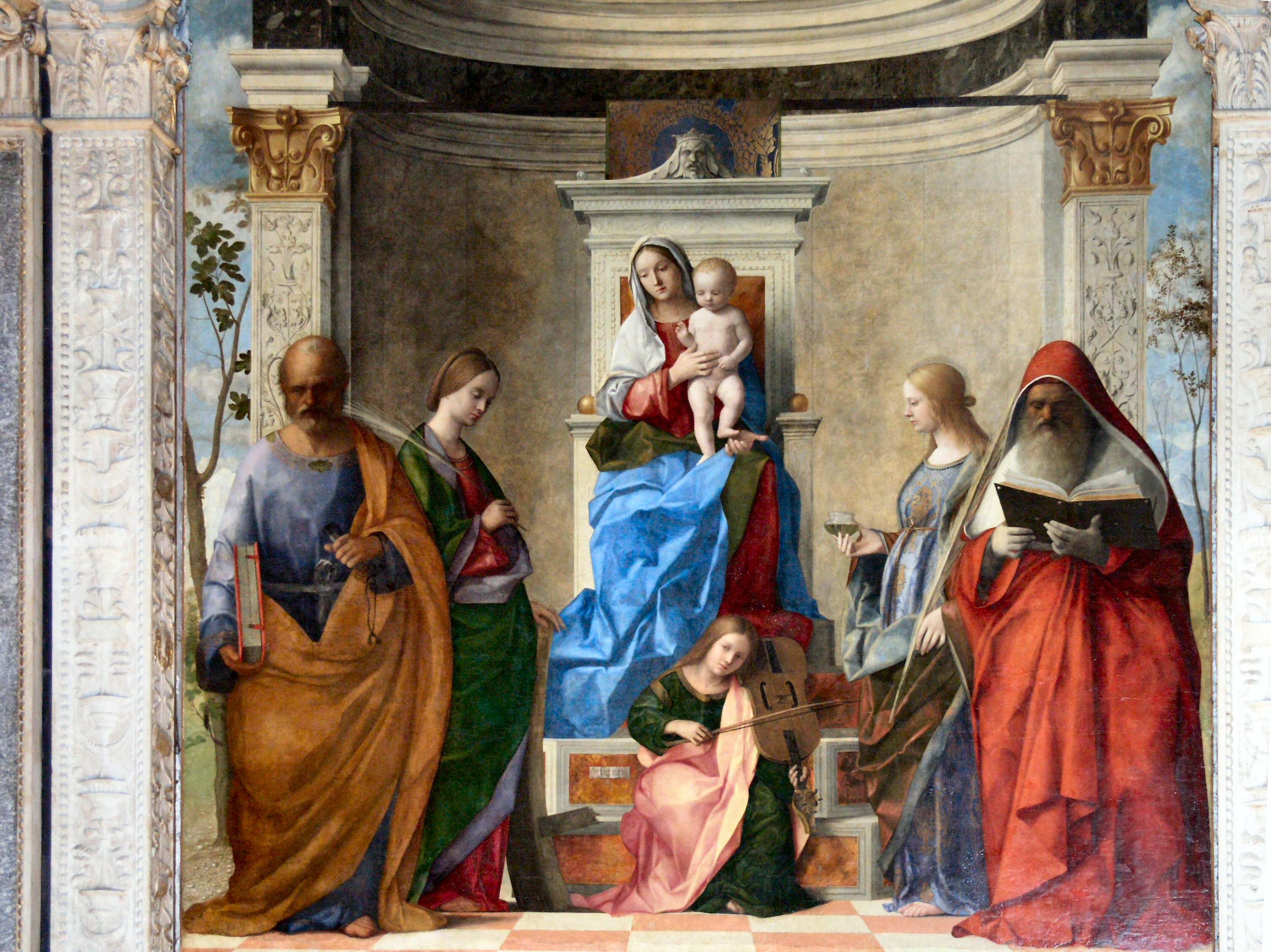 Sacra Conversazione von Giovanni Bellini, San Zaccaria Venedig.